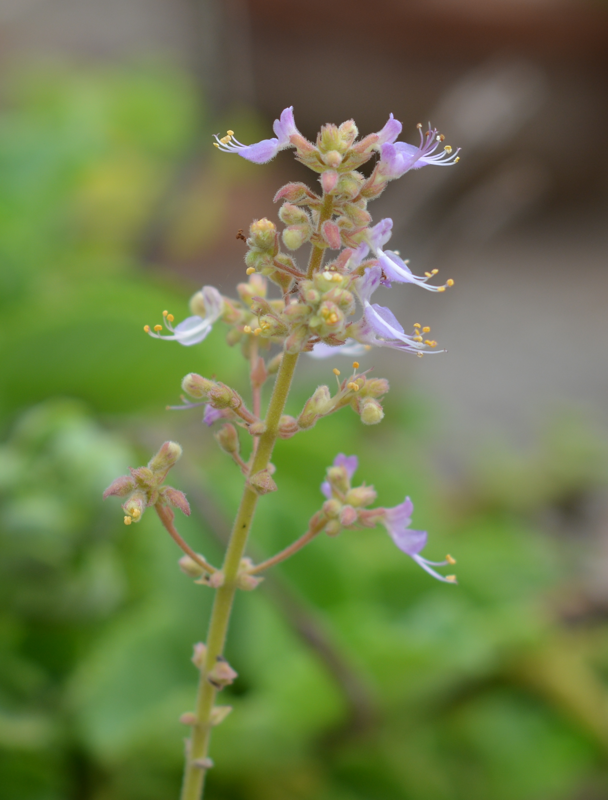 പനിക്കൂർക്കയുടെ പൂവ്